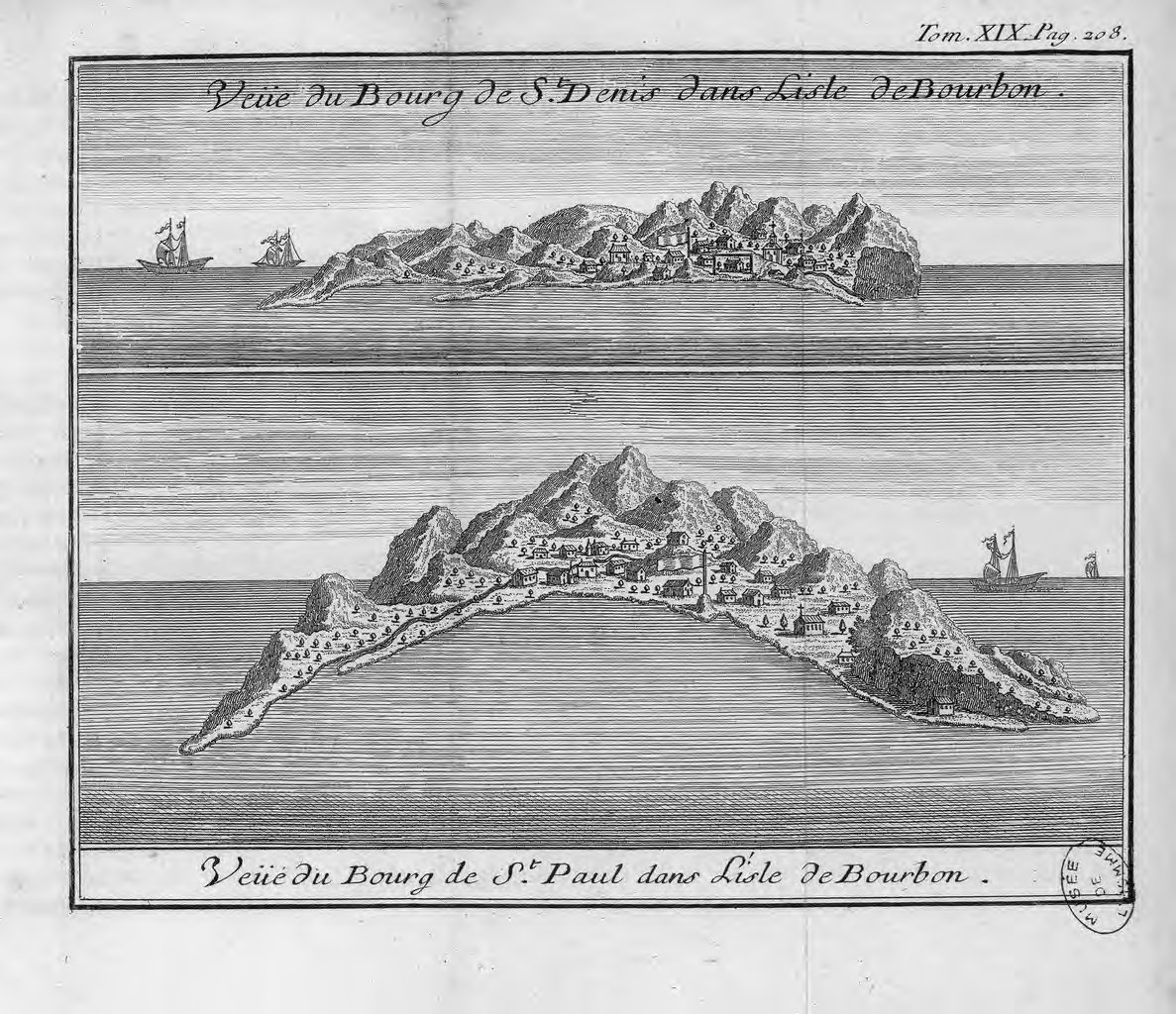 Nicolas Ransonnette (1745-1810): Veüe du Bourg de St. Denis dans l’isle de Bourbon et Veüe du Bourg de St. Paul dans L'isle de Bourbon (Vue des bourgs de Saint-Denis et Saint-Paul dans l'Isle de Bourbon), extraites de Illustrations de Lettres édifiantes et curieuses, éditeur J. G. Mérigot, Paris, date d'édition 1780-1783.